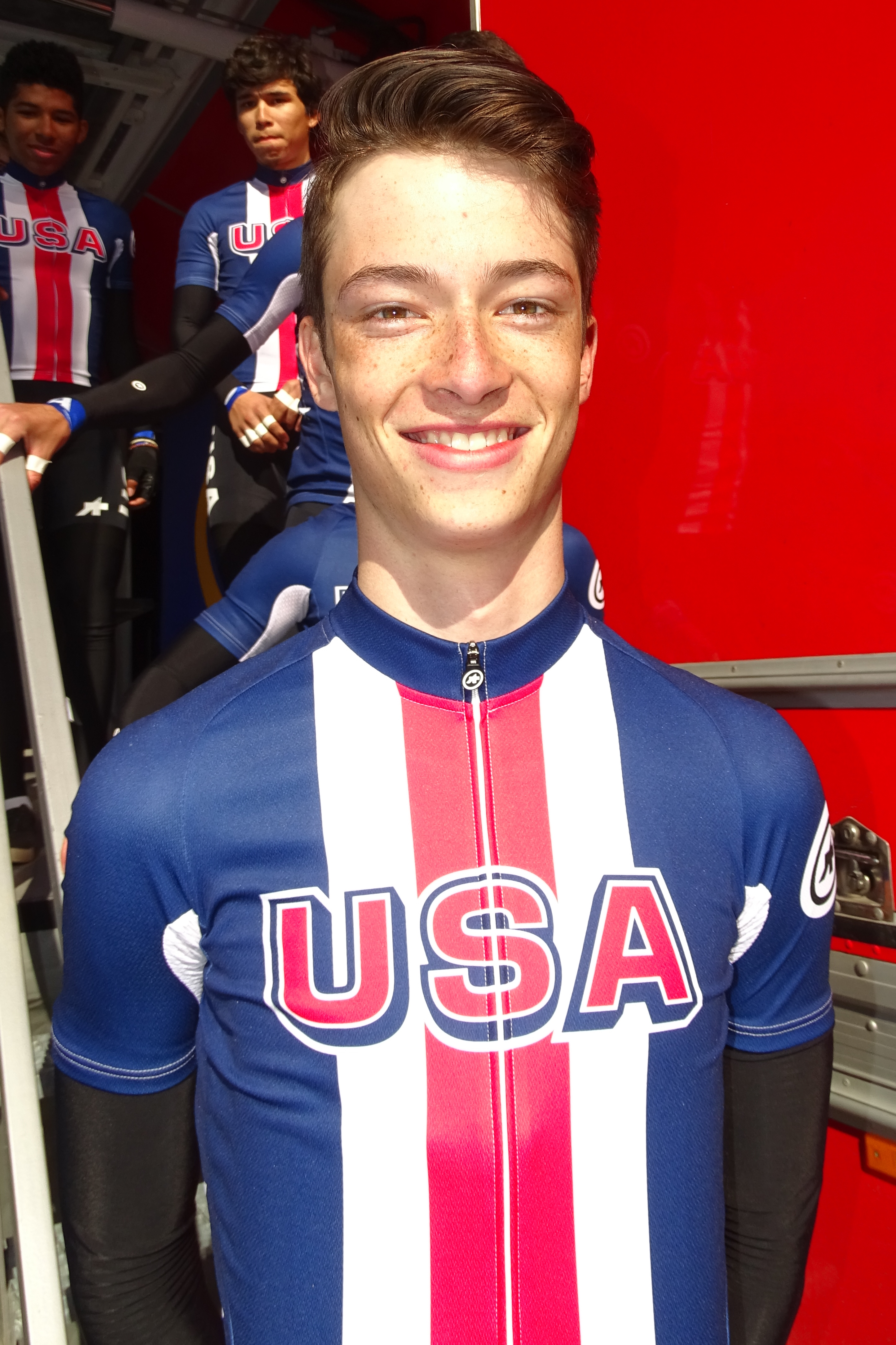 Reportage réalisé le dimanche 10 avril à l'occasion du départ du Paris-Roubaix juniors 2016 à Saint-Amand-les-Eaux, France.